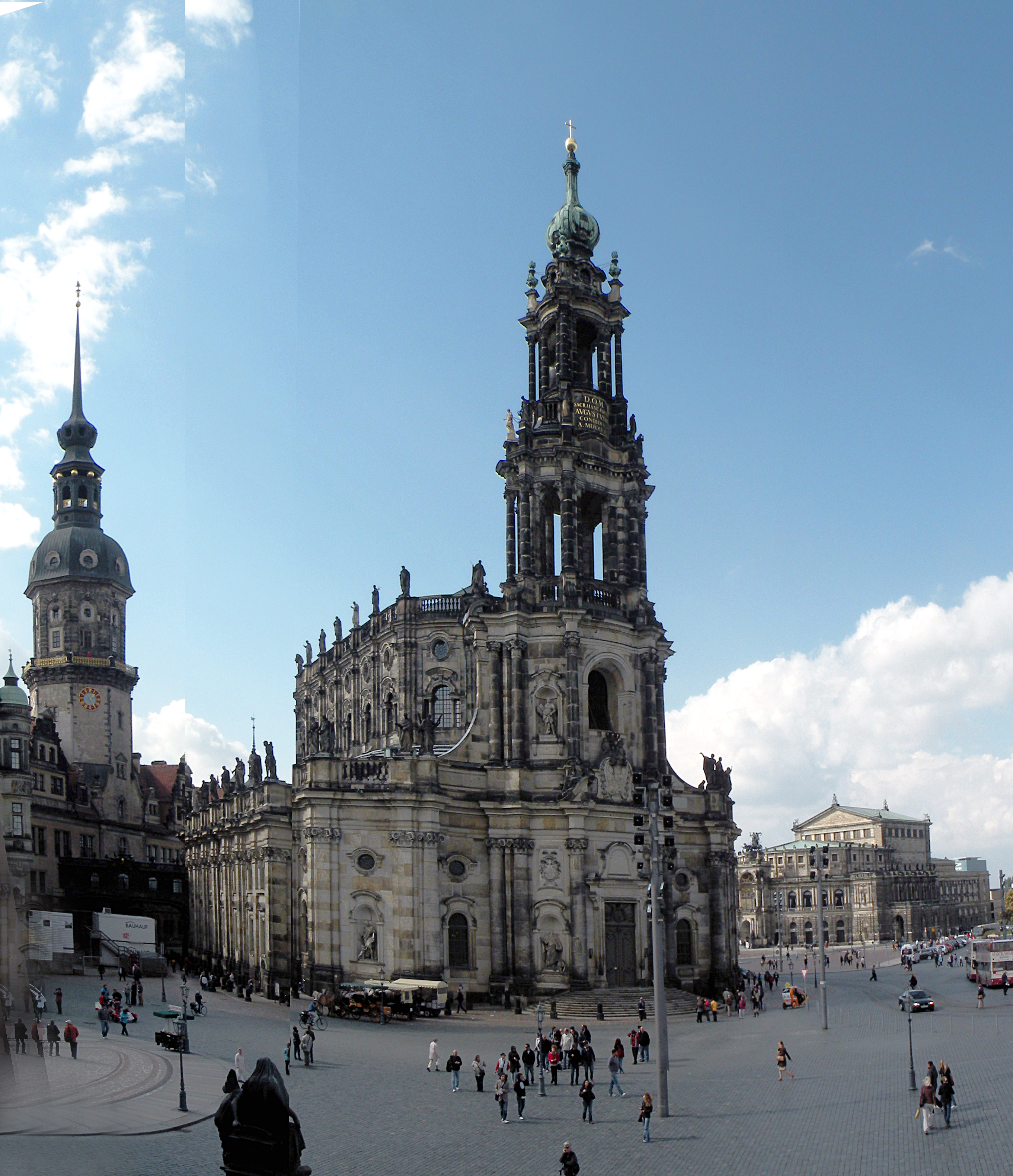 Hofkirche_(Dresden).